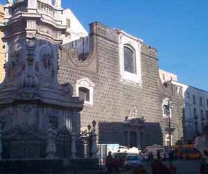 Chiesa del Gesù Nuovo, Napoli